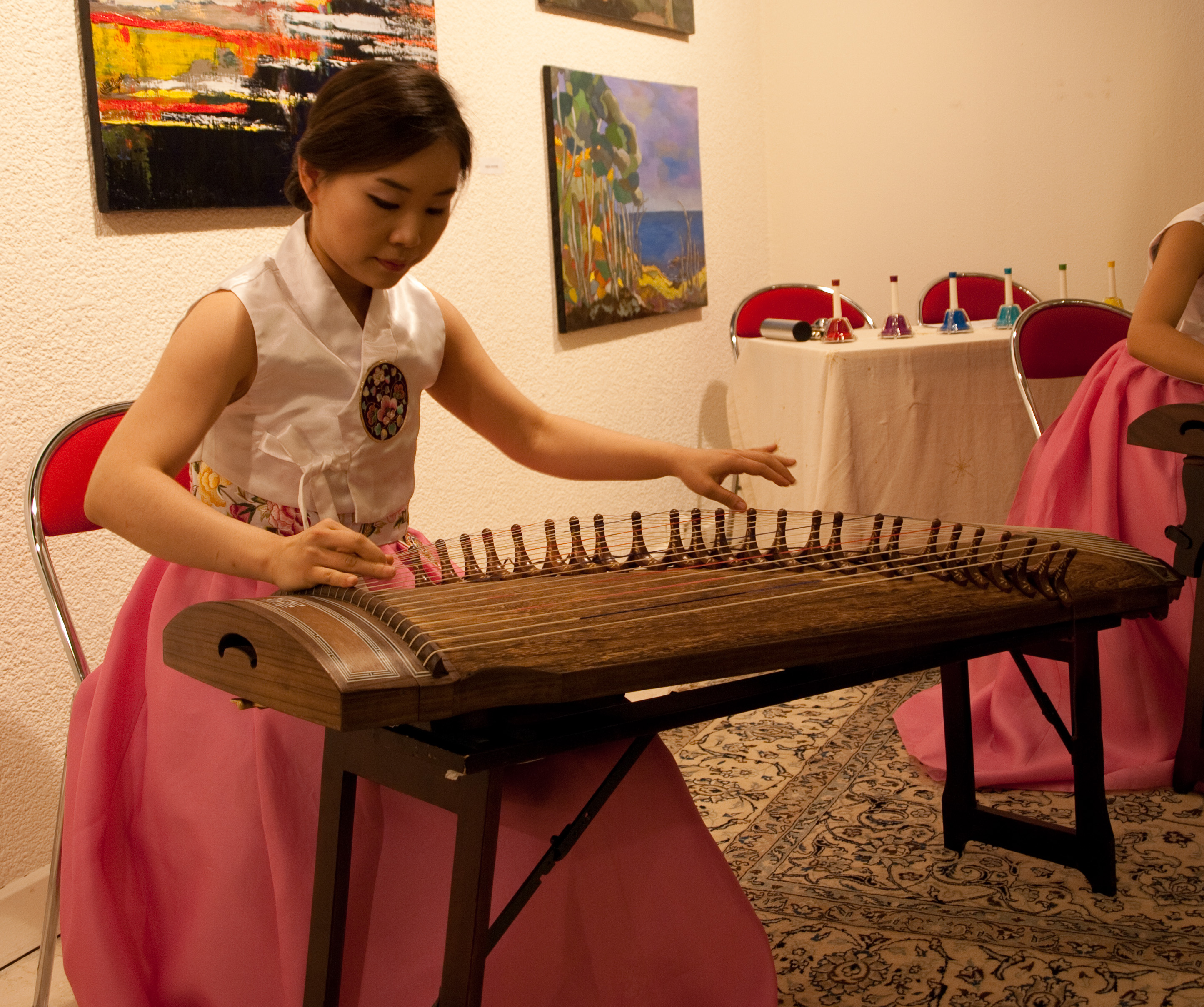 2011.08.05 - Concert Kwak SooEun & l’ensemble de gayageum La-on G 2011.08.05 - 콘서트 곽수은 & 가야금앙상블 ‘라온G' Centre Culturel Coréen - Paris